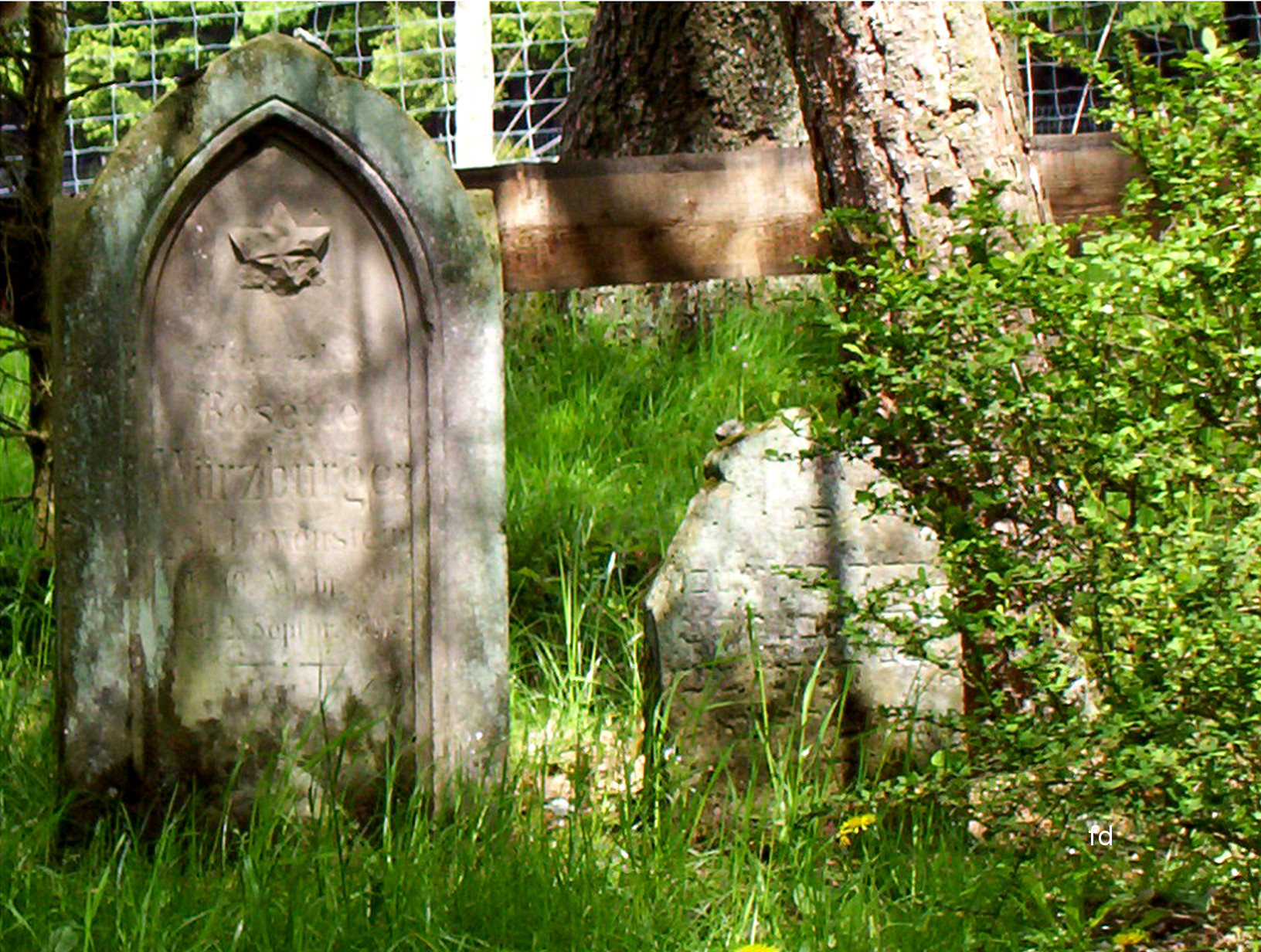 Jüdischer Friedhof am Jaistein Wenholthausen.